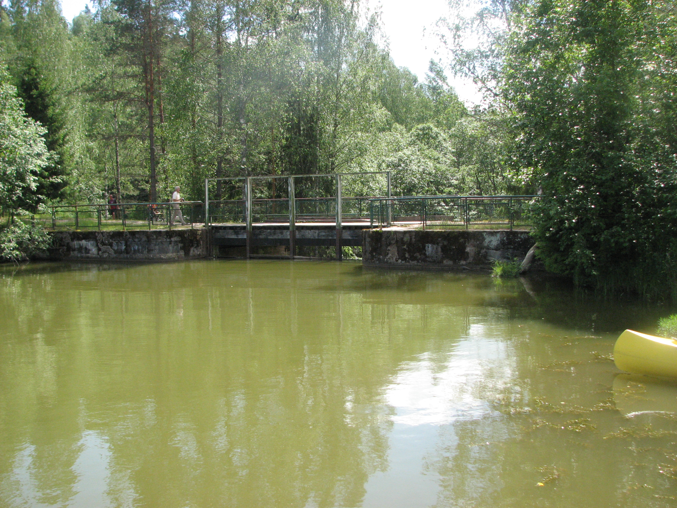 Saesaare paisjärv ja hüdroelektrijaama tamm